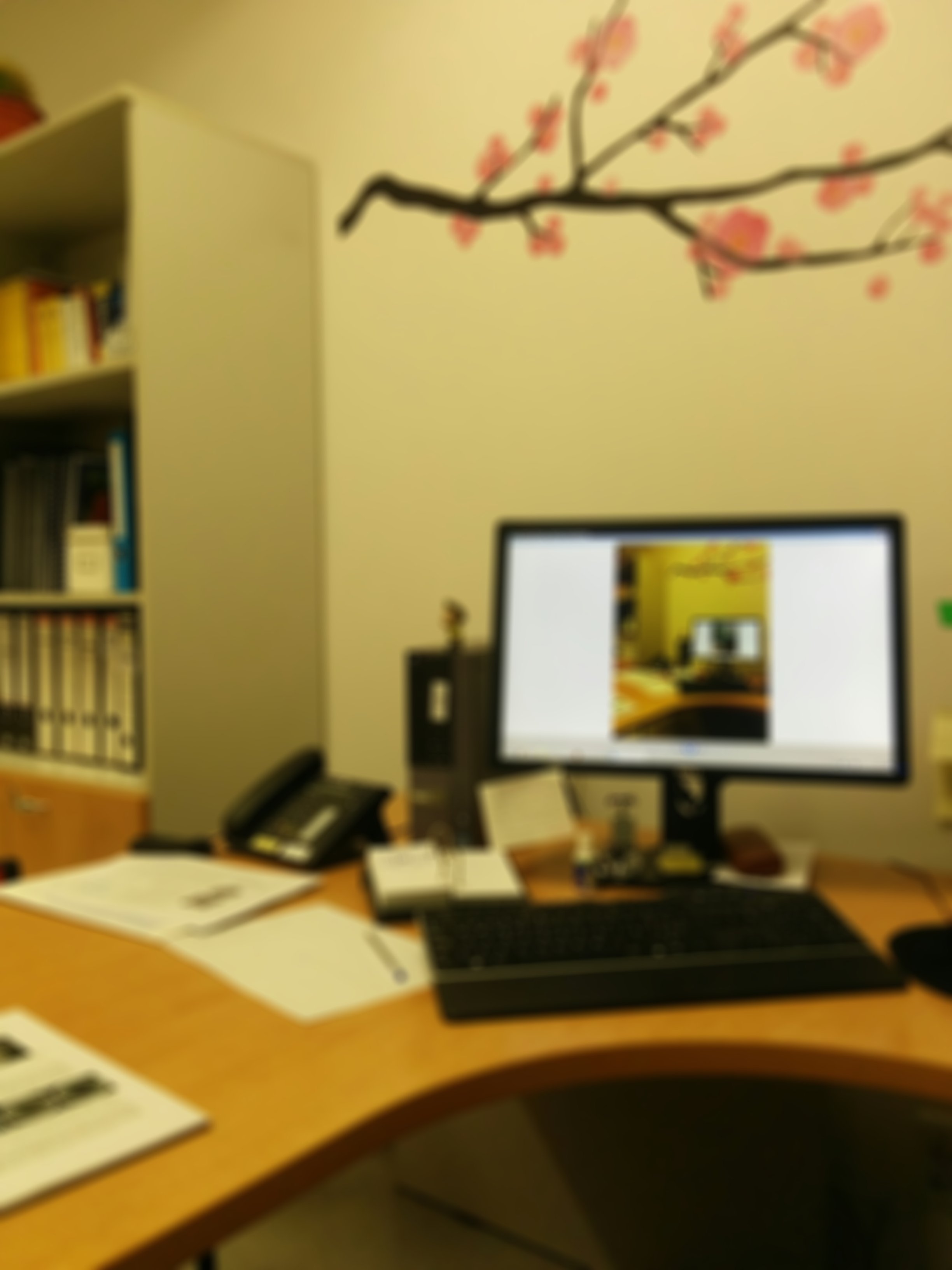 Imagen a la que se ha aplicado un filtro de media con radio = 20 píxeles